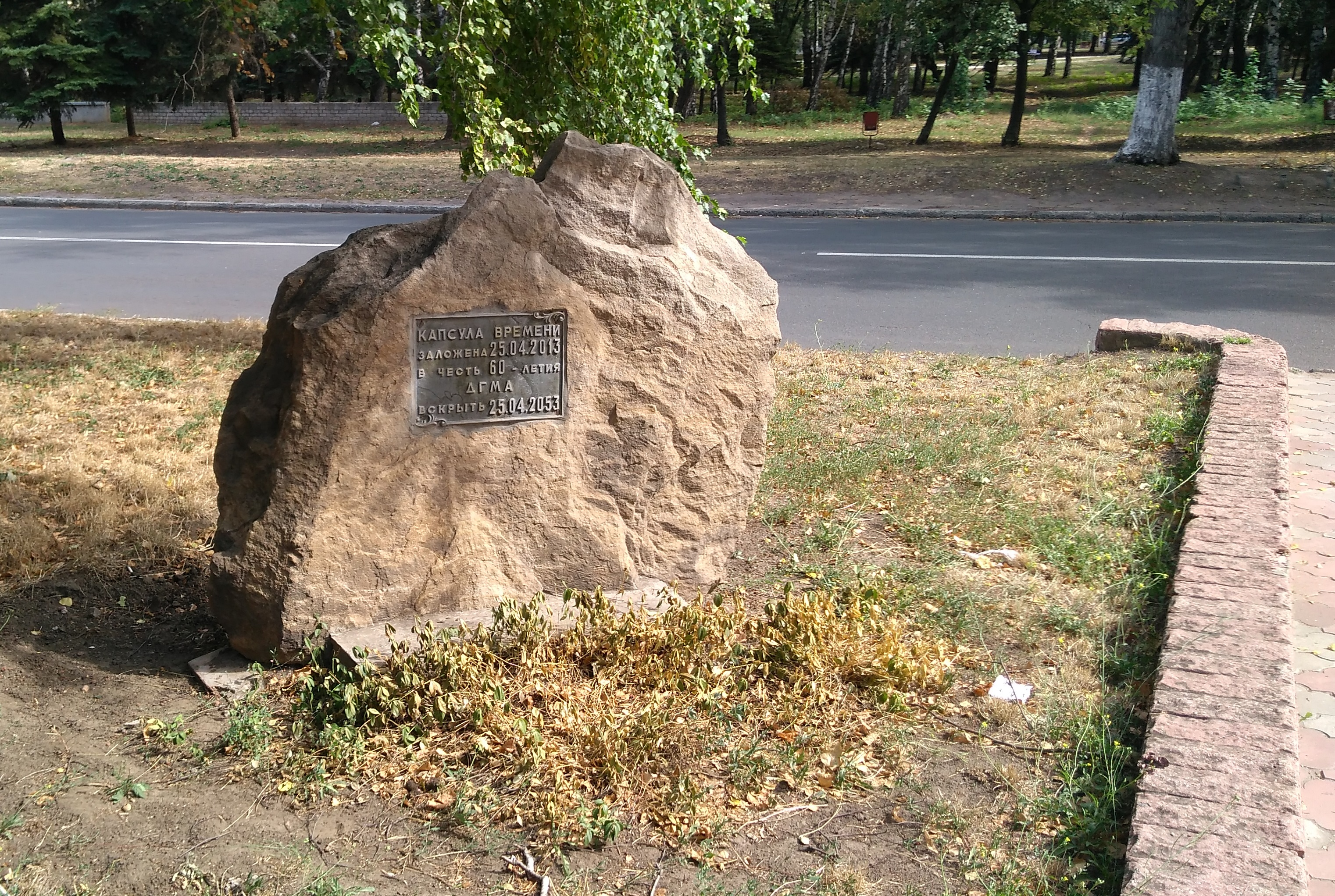 Капсула времени ДГМА